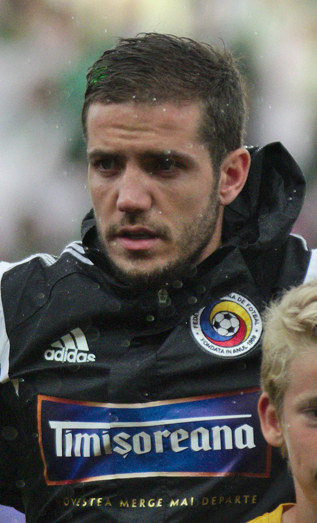 Algérie-Roumanie - 20140604 - Alexandru Chipciu